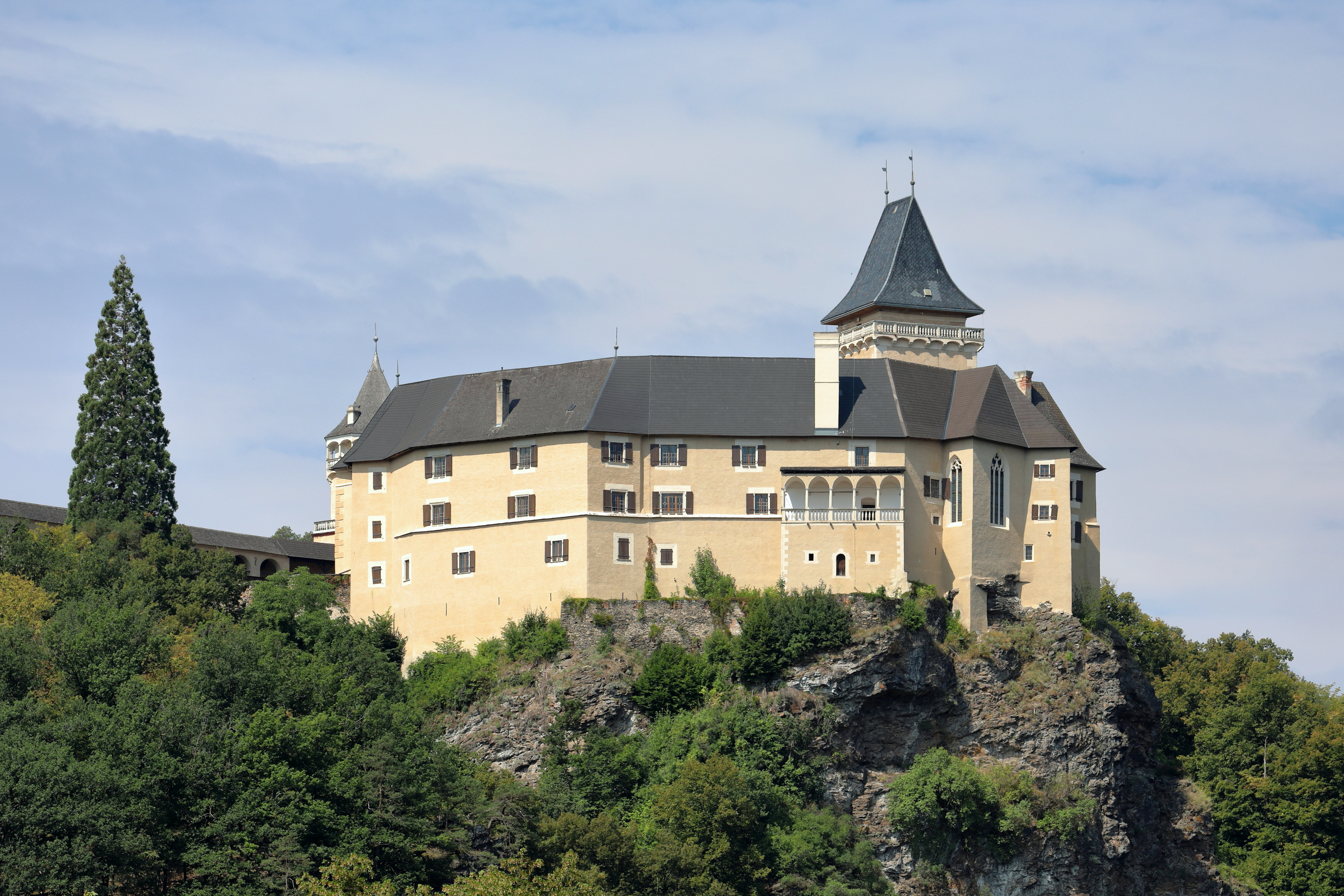 Ostansicht des Schlosses Rosenburg in Rosenburg, ein Ortsteil der niederösterreichischen Gemeinde Rosenburg-Mold.Ursprünglich eine mächtige mittelalterliche Burg in Berglage über dem Kampufer. Ende des 16. Jahrhunderts erfolgte ein Umbau zu einem Renaissanceschloss und in der 2. Hälfte des 17. Jahrhunderts ein weiterer Ausbau. Nach einem Brand 1800 verfiel das Schloss. Zwischen 1859 und 1875 ließ Ernst Karl von Hoyos-Sprinzenstein die vom Verfall bedrohte Rosenburg nach den Darstellungen des Schlosses in der Topographia Windhagiana von 1673 orientierend, umfassend restaurieren und machte sie als eine der ersten Burgen in Österreich öffentlich zugänglich.